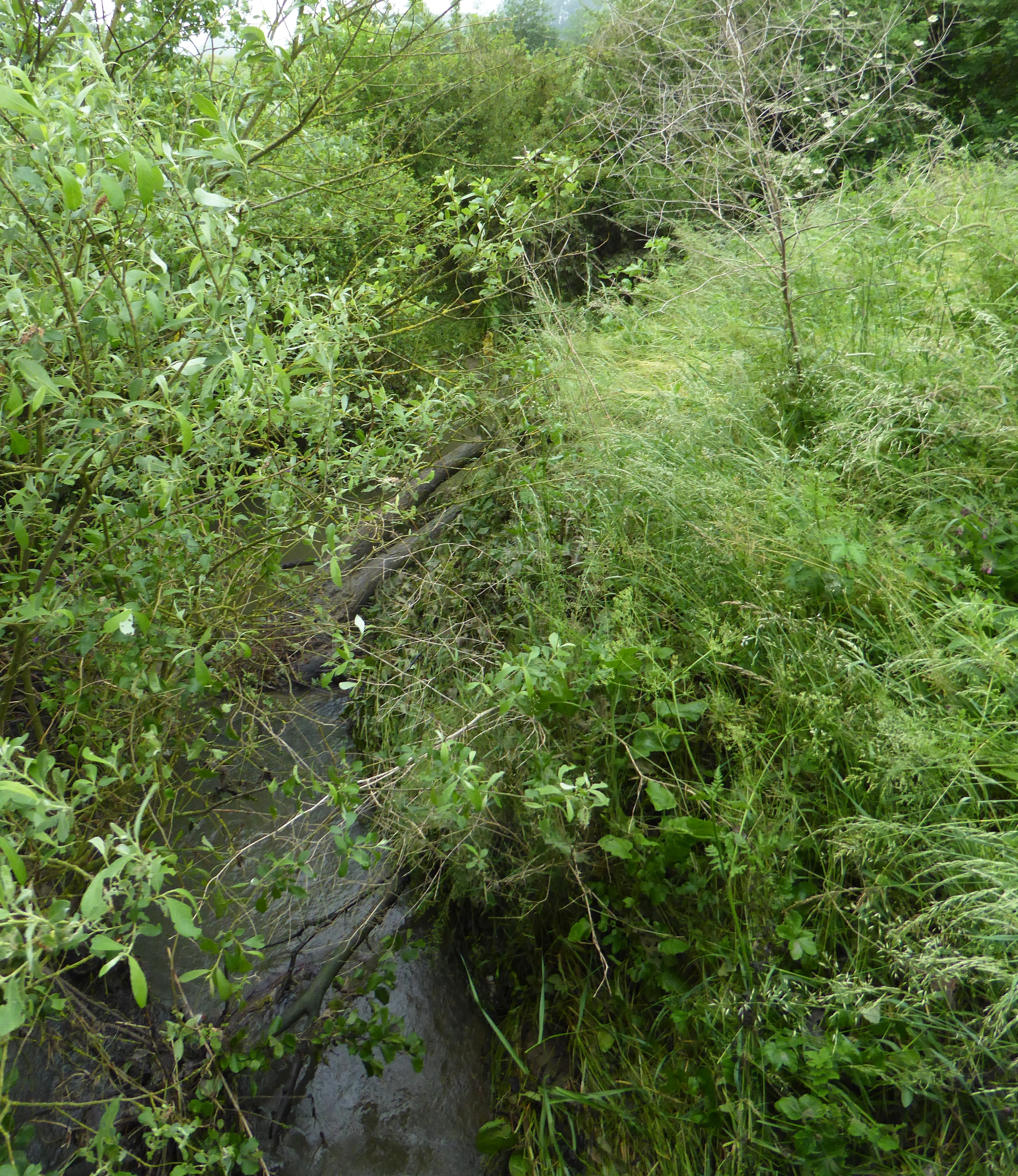 Bersée Nord Nord-Pas-de-Calais-Picardie France.